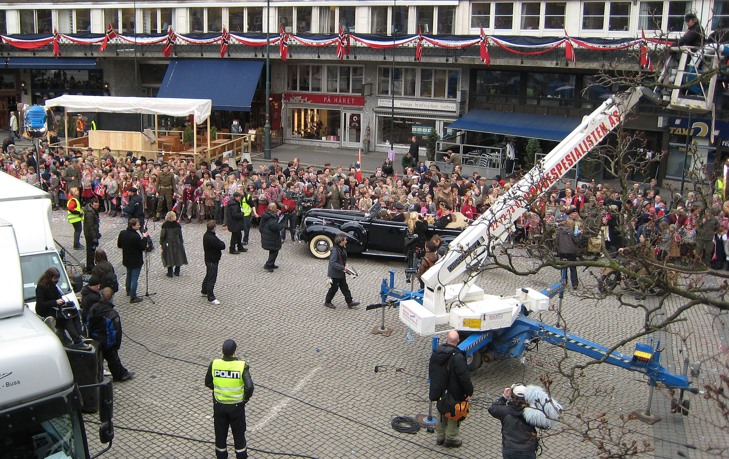 Fra innspillingen av Max Manus